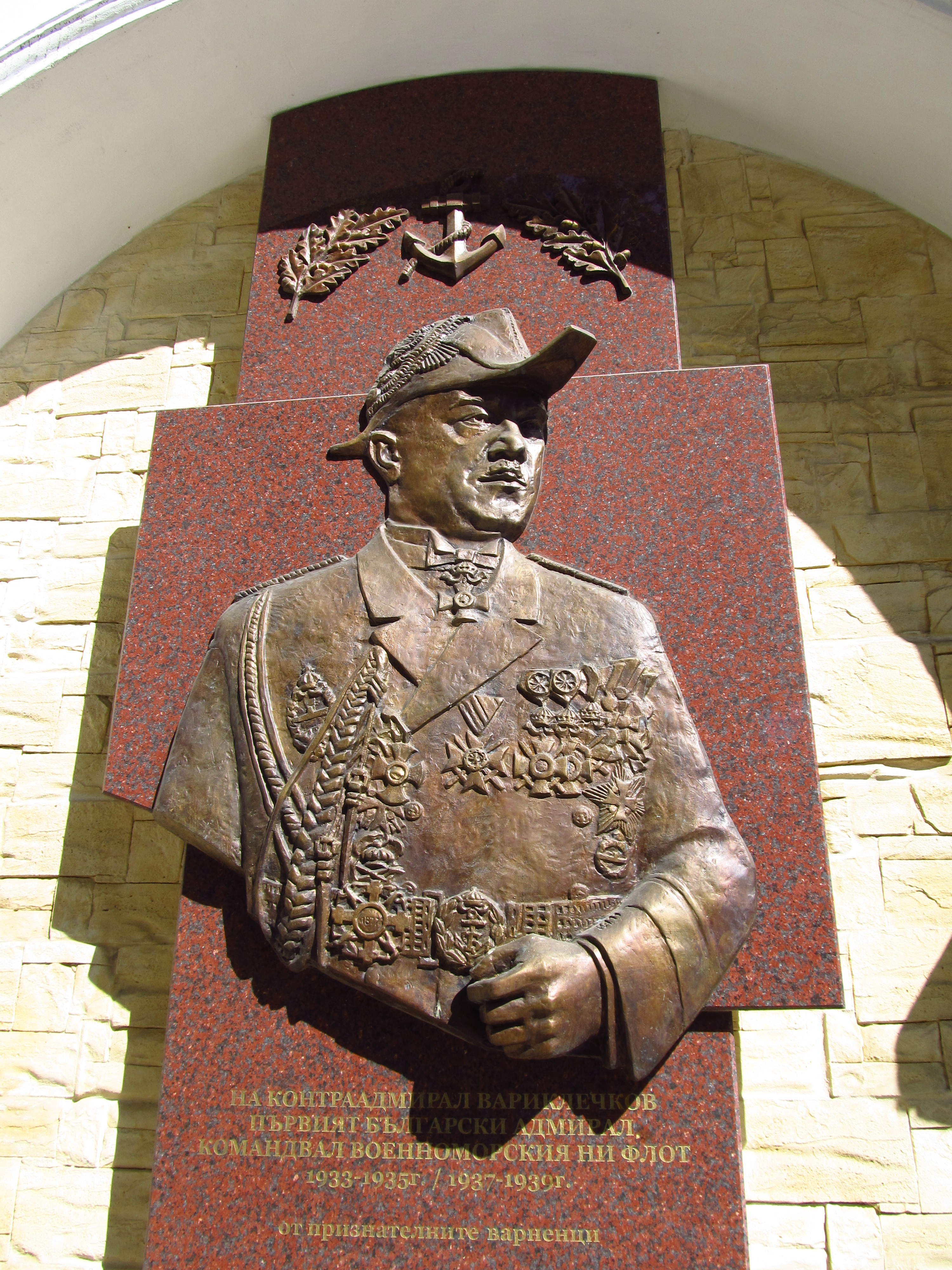 Памятна плоча на контр-адмиралът Иван Вариклечков на сградата на Щаба на Военноморския флот на България